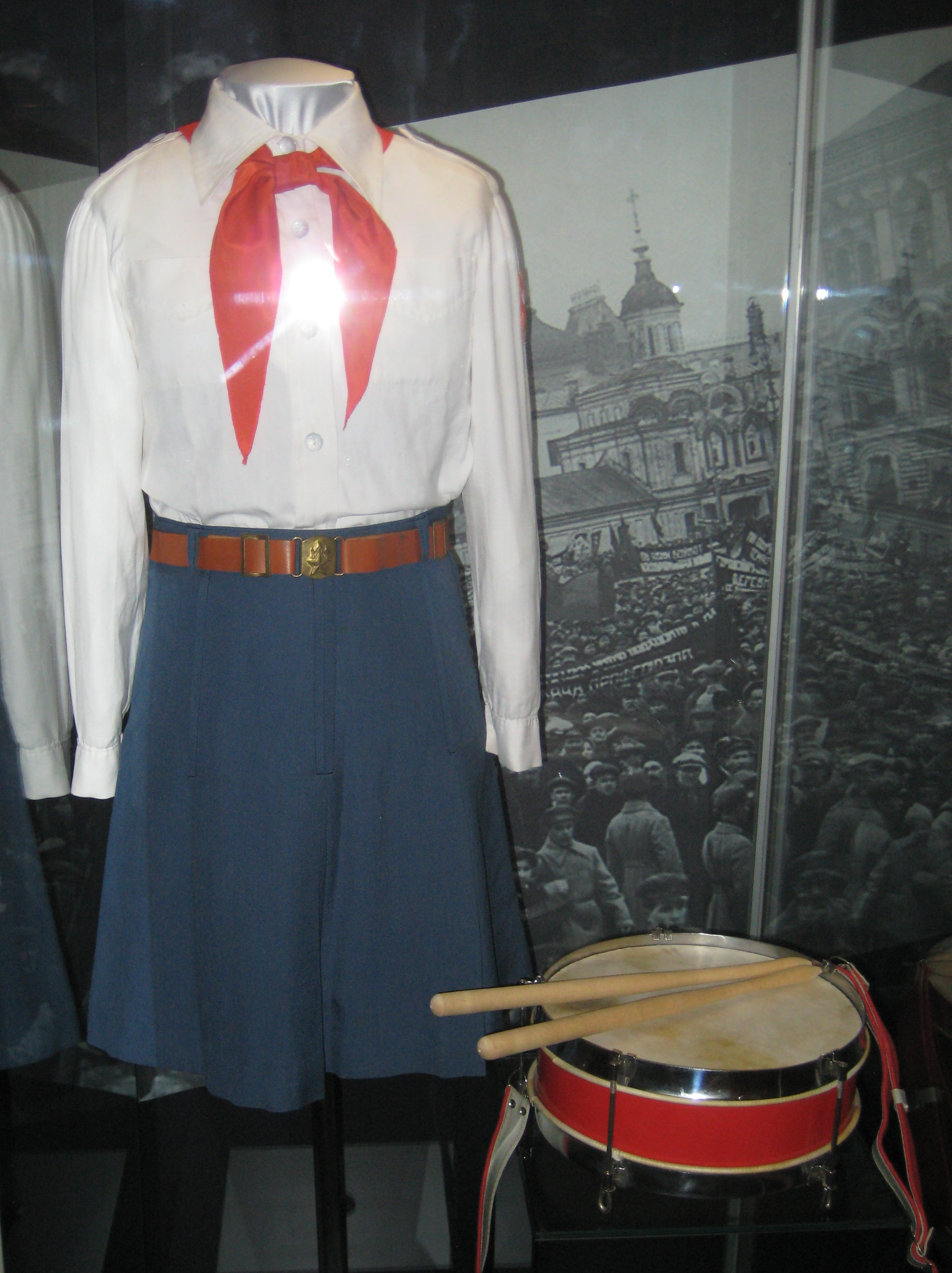 Парадная пионерская форма, 1970-е. ГИМ